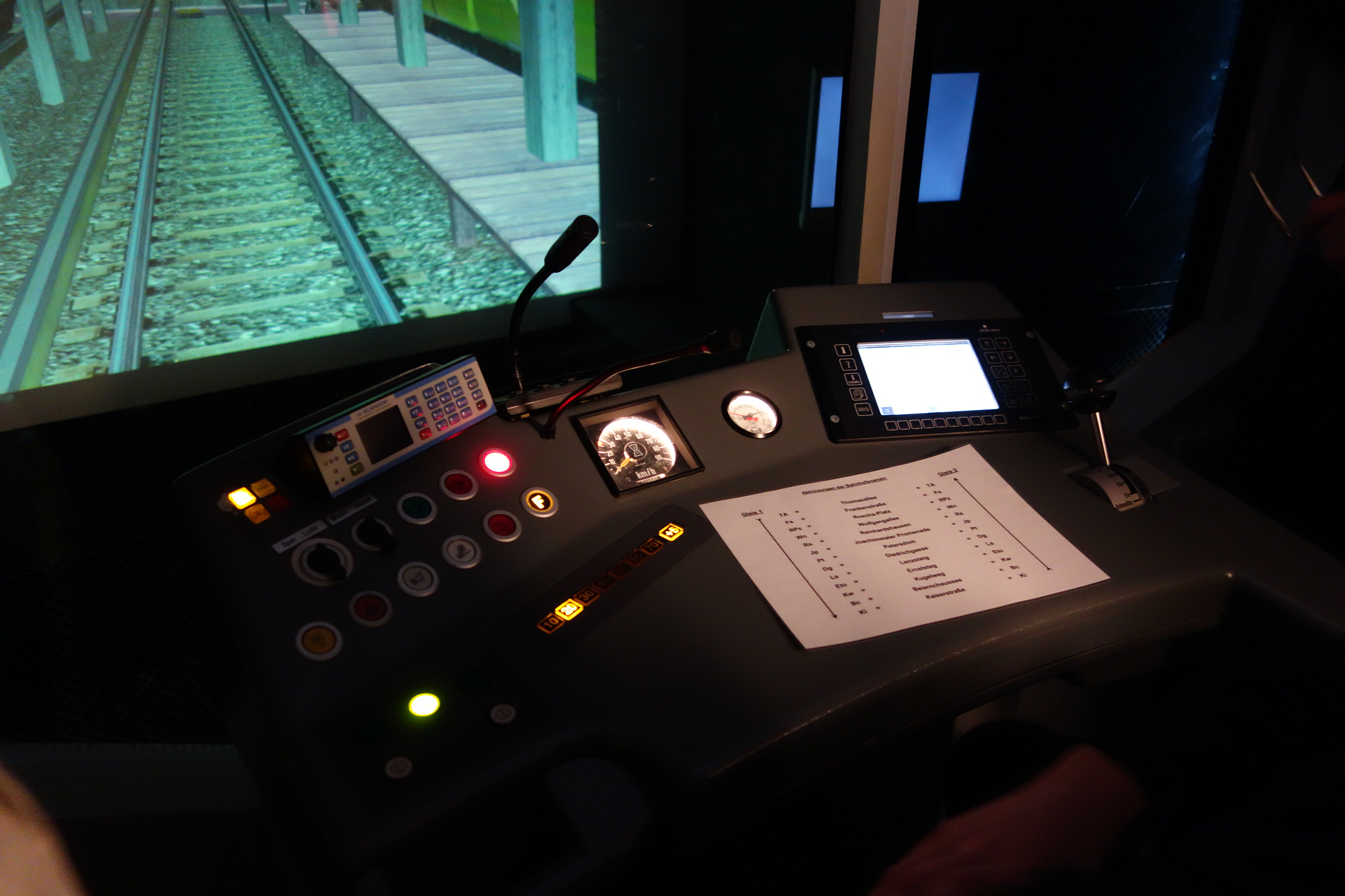 U-Bahn Berlin, Fahrsimulator HK